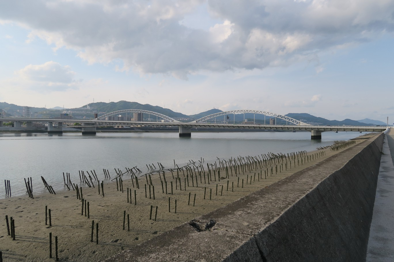 太田川大橋（観音側下流から撮影）